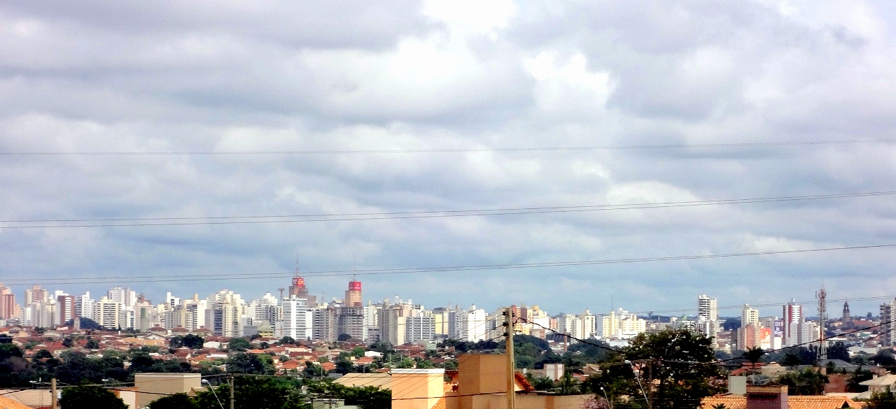 Vista da cidade de São José do Rio Preto